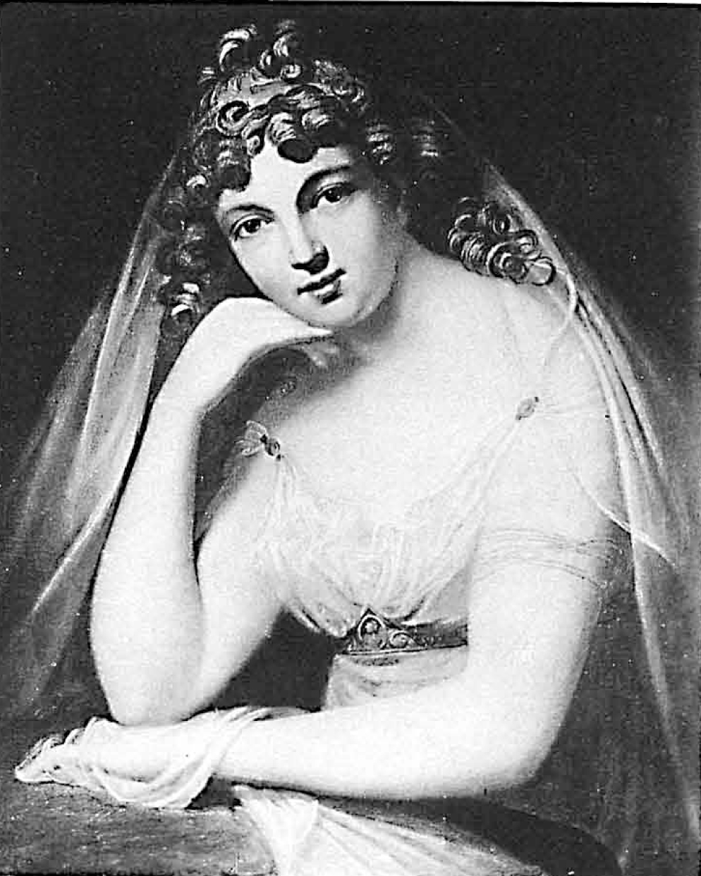 Nastas'ia Fedorovna Minkina, 177 -1825